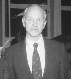 im Hygiene-Institut der Christian-Albrechts-Universität (CAU). Im Bild v.l.n.r.: Vorsitzender des Kuratoriums der Feldberg-Stiftung Prof. Dr. Robert Stämpfli, Immunologe Prof. Dr. Gowans, CAU-Präsident Prof. Dr. Gerd Griesser und Immunologe an der CAU Prof. Dr. Wolfgang Müller-Ruchholtz.